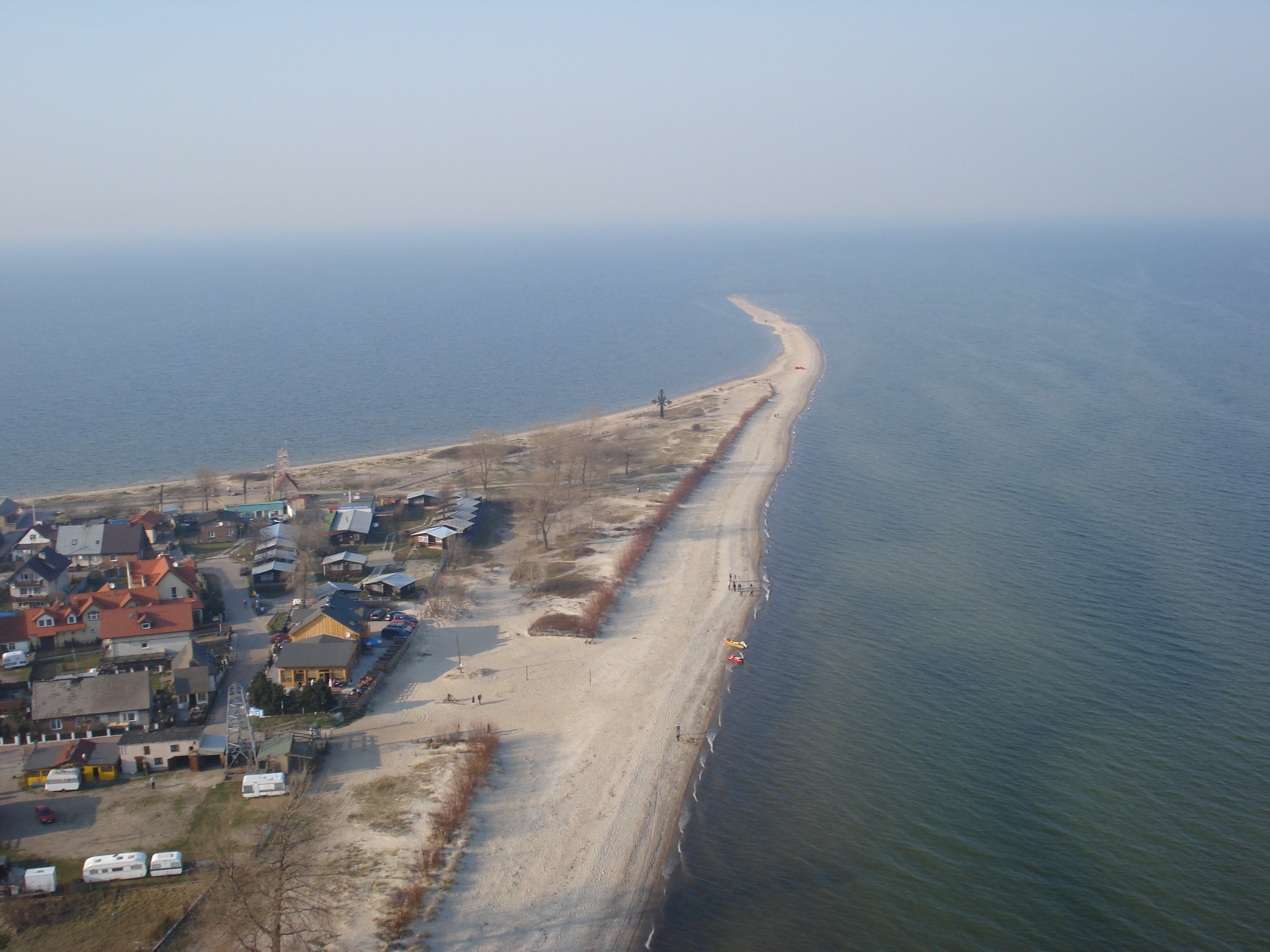 Przelot skrzydłem Oksywie-Puck